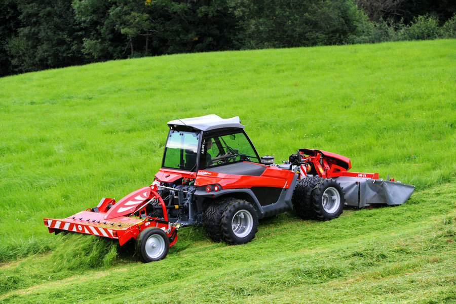 Aebi TT241